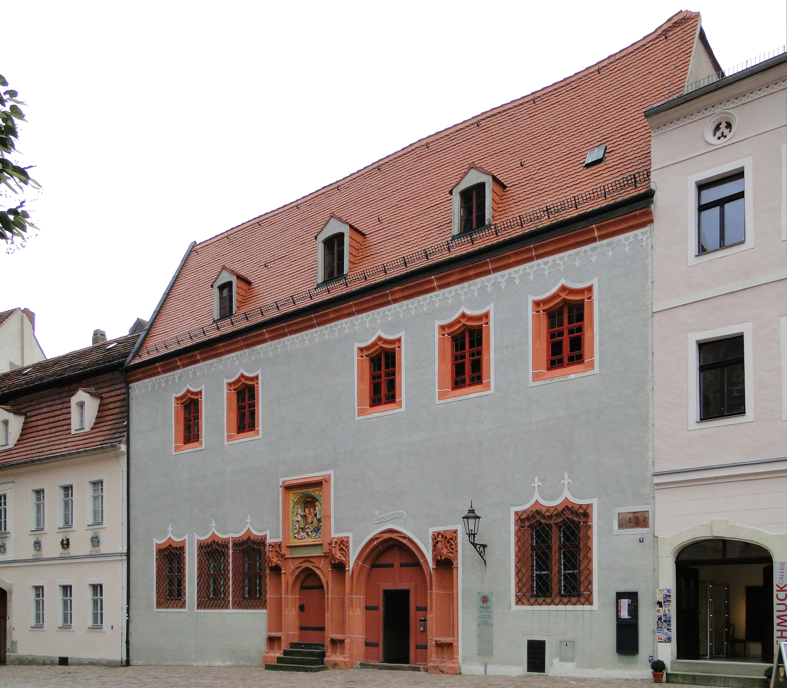 Domplatz 7 Meißen